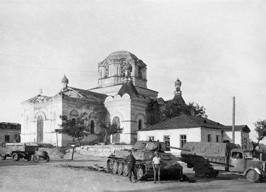 Церковь Введения во храм Пресвятой Богородицы в Белой Калитве в период нацистской оккупации